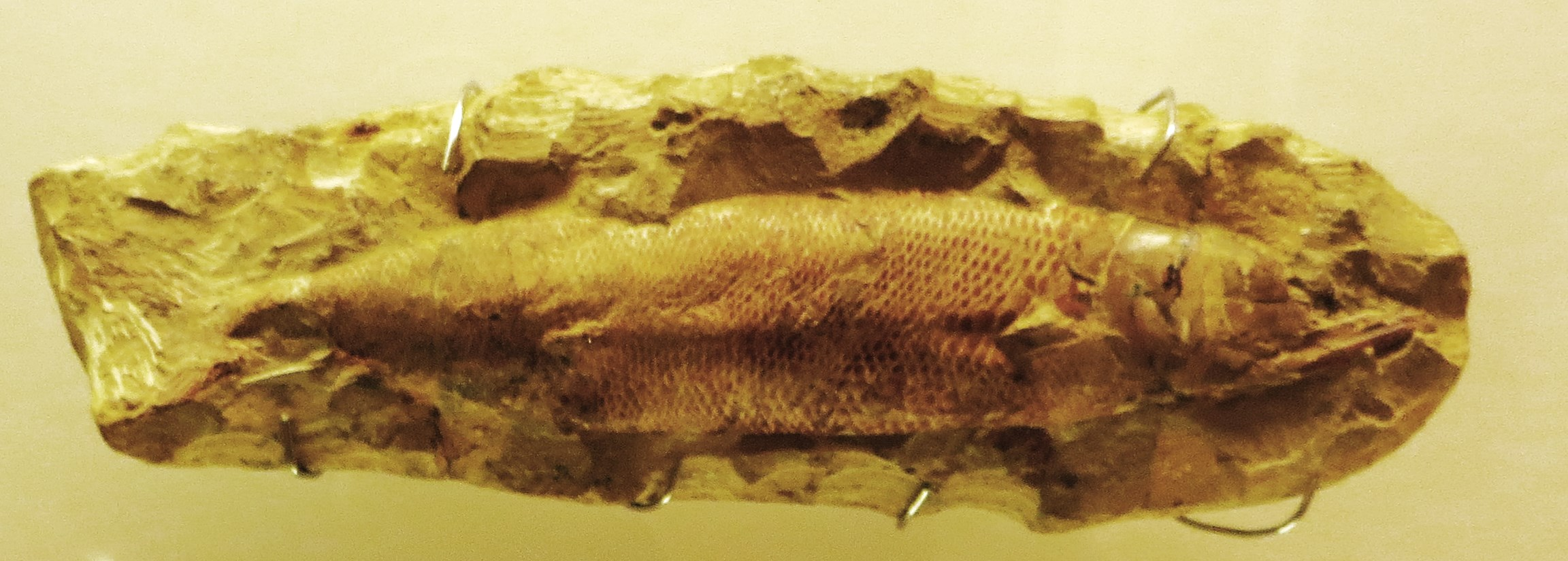 Fossil of Rhacolepis, an extinct fish- Took the picture at Museo de la Naturaleza y el Hombre - Tenerife